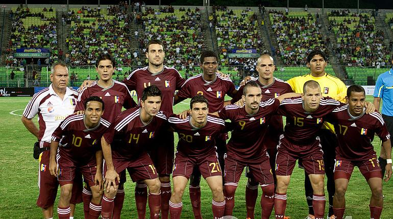 Selección de fútbol de Venezuela previo a un partido amistoso ante Guinea. Arriba de izquierda a derecha: Giacomo Di Giorgi, Andrés Túñez, José Luis Granados, José Manuel Rey, Leo Morales. Abajo de izquierda a derecha: Yohandry Orozco, Franklin Lucena, Alexander González, Giancarlo Maldonado, Alejandro Moreno y Ángel Chourio.